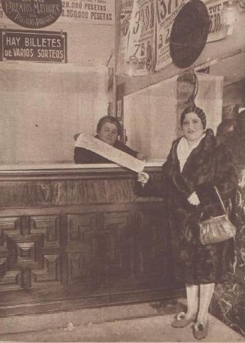 La lotera Doña Manolita en 1929, Madrid.